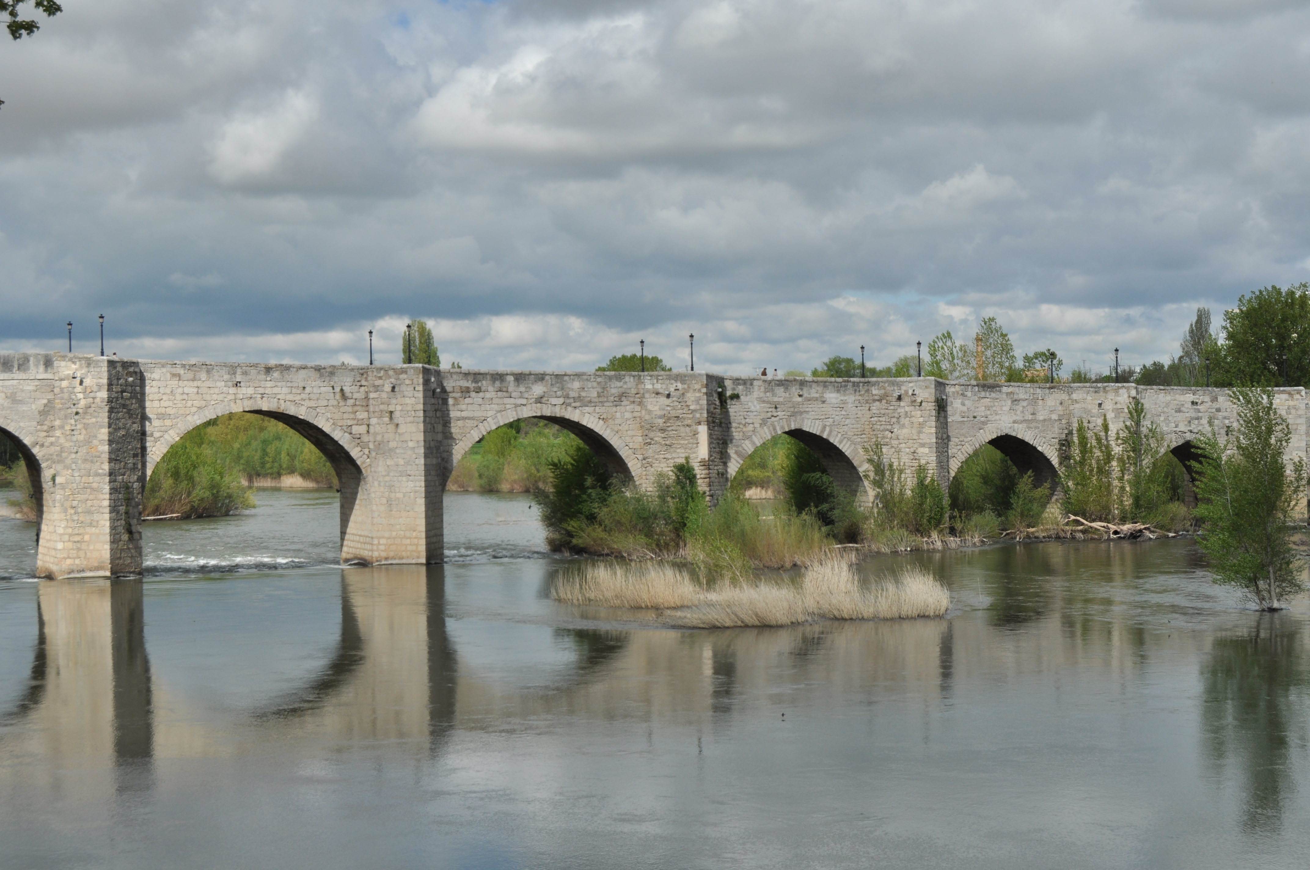 Cabezon de Pisuerga - 002